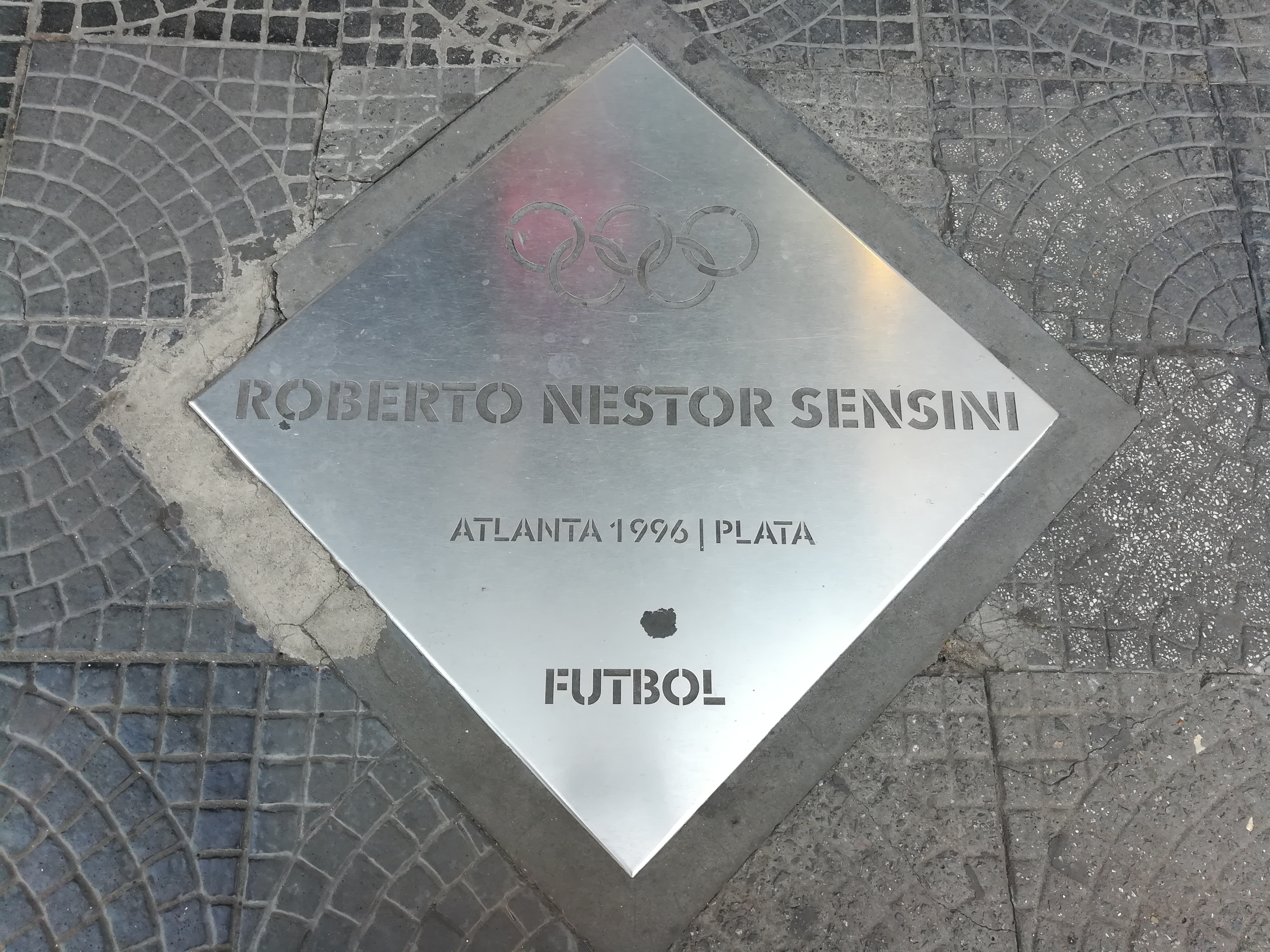 Paseo de los Olímpicos de los en la Avenida Pellegrini (Rosario).